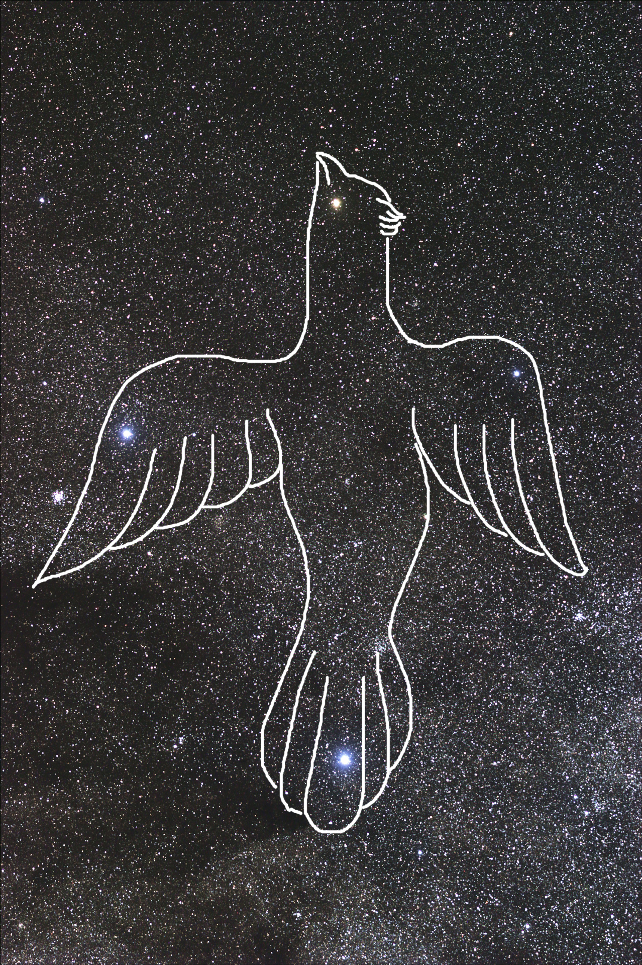 Pauí-Pódole, o Pai-do-Mutum. Concepção indígena da constelação da Crux. Ilustração criada para o artigo sobre o livro Macunaíma, de Mário de Andrade.